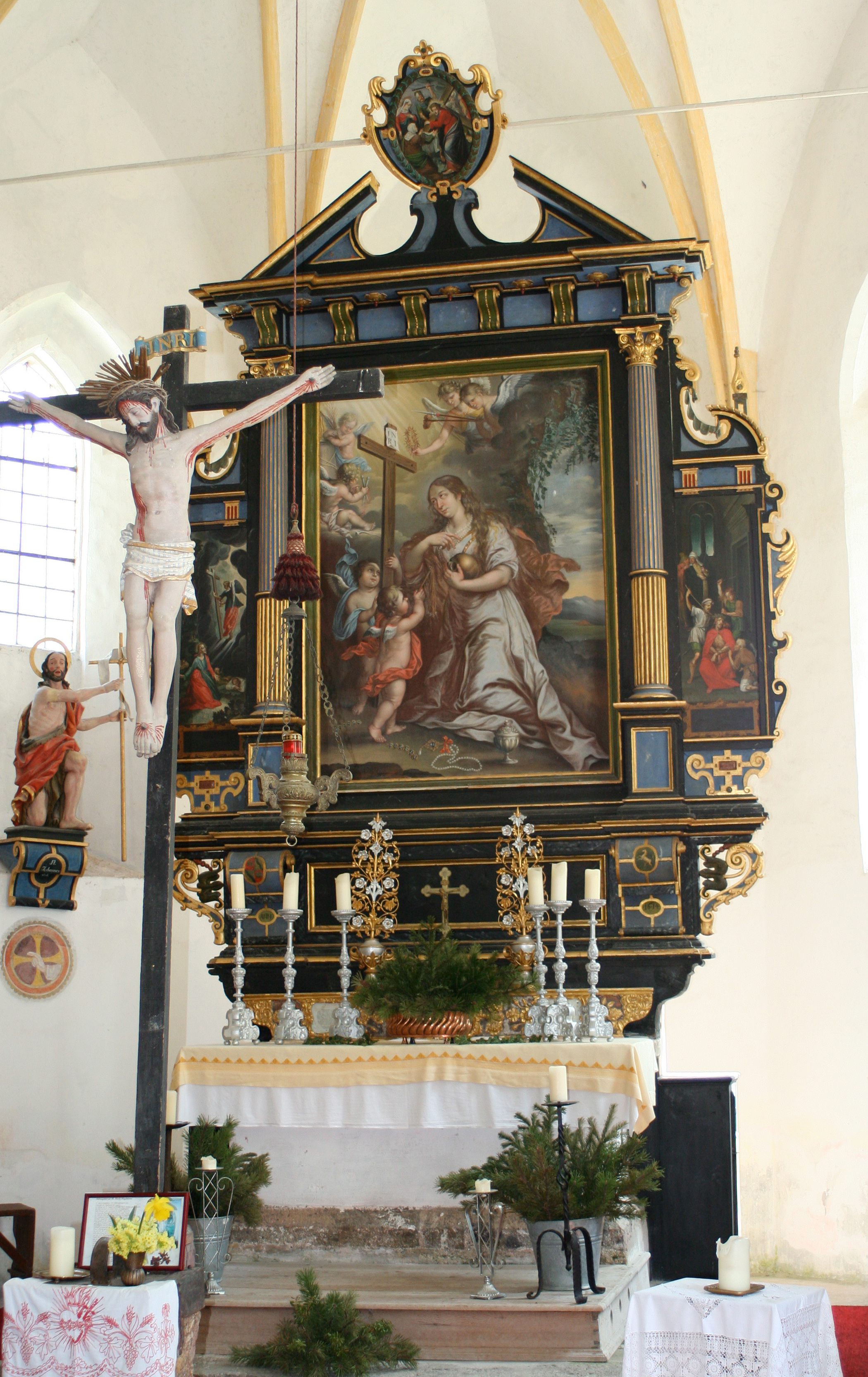 Altar der Kirche von St. Magdalena im Halltal, wurde 1614 für die Kirche Absam gestiftet und 1685 hinauftransportiert. Das Altarbild mit Maria Magdalena stammt von Paul Ainhauser aus dem Jahr 1703 Quelle: Franz Grass, St. Magdalena im Halltal in der Gegenwart.